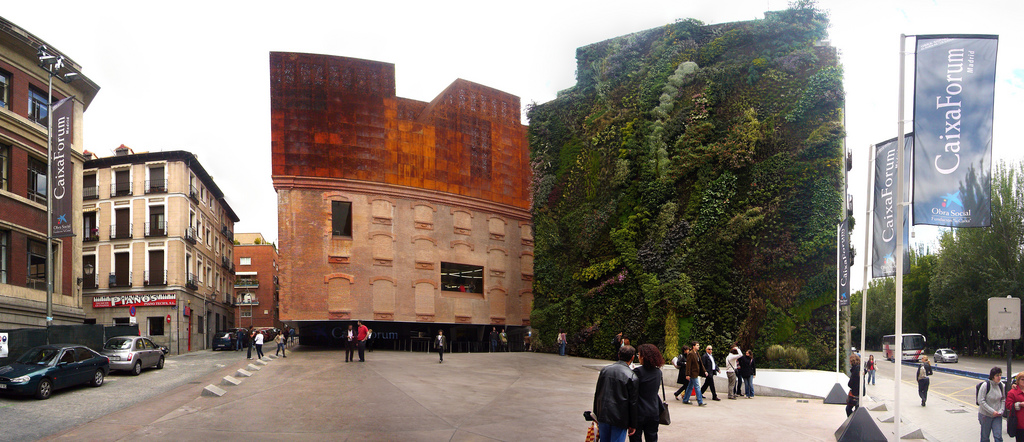 El diumenge passat visitàrem l'exposició "Alphonse Mucha 1860-1939 Seducción, modernidad y utopia" que ens oferie CaixaForum en aquest nou centre cultural a Madrid. Quina sort varem tindre Elisa i jo de poder gaudir d'aquesta esplèndida mostra abans de marxar cap a casa.